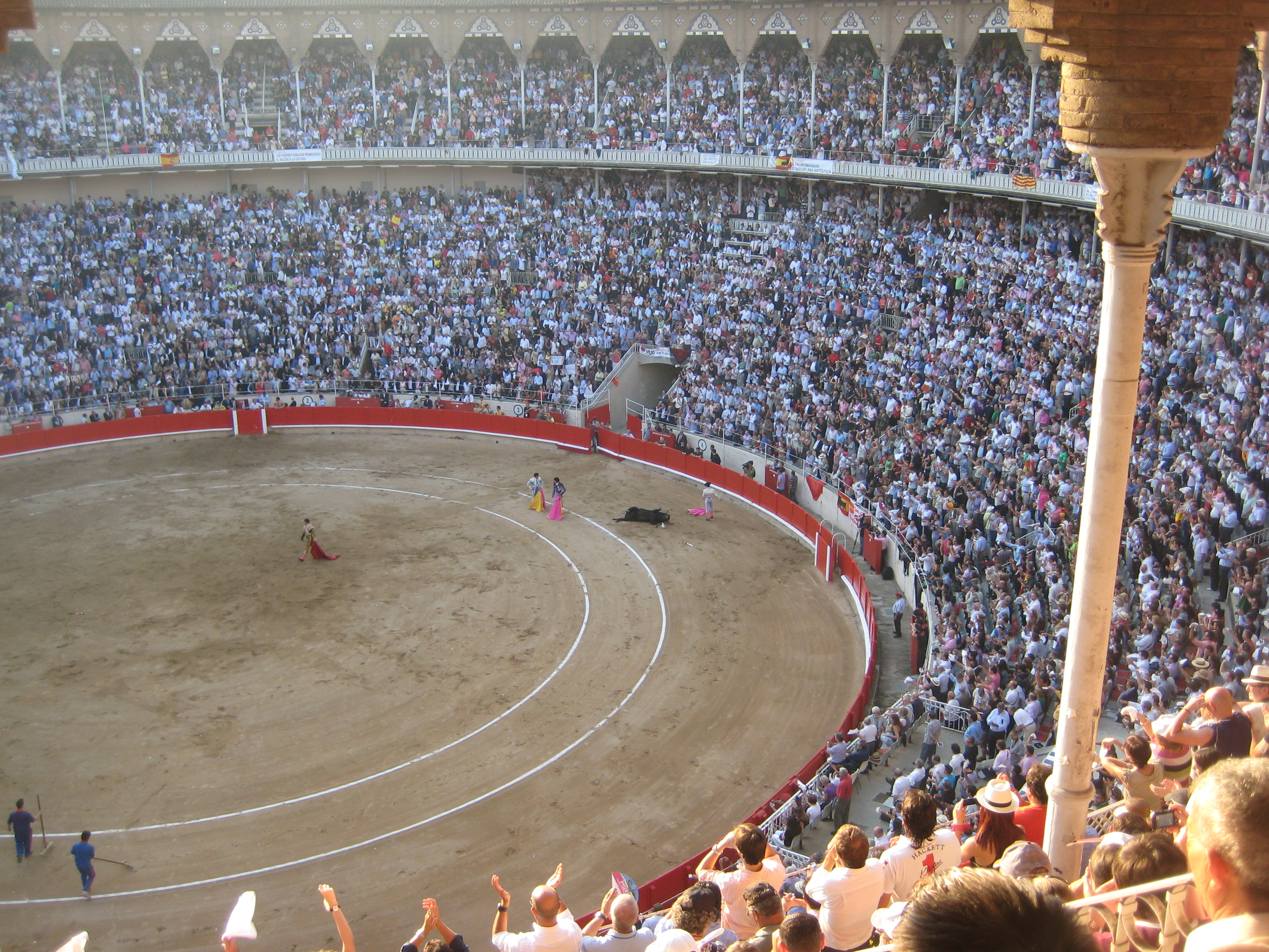 Última cursa de toros celebrada a la Monumental, el 25 de setembre del 2011, durant la Festa Major de Barcelona, tres mesos abans de l'entrada en vigor de l'abolició de les corrides de toros acordada pel Parlament de Catalunya.